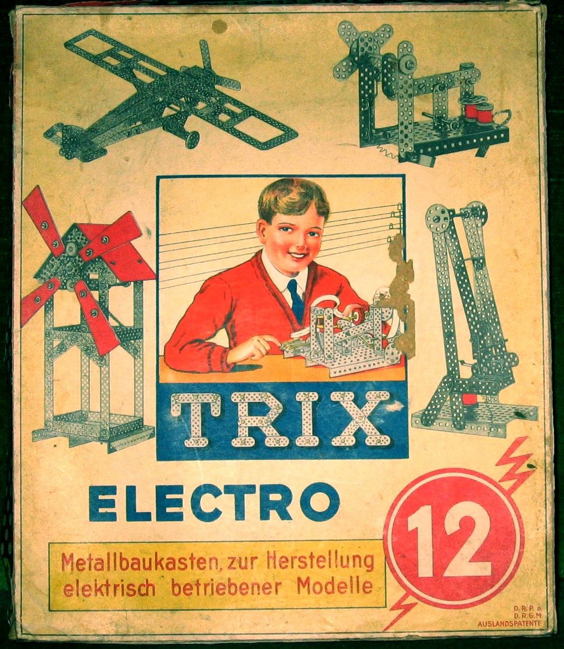 Trix Electro Baukasten aus den 1940-er Jahren